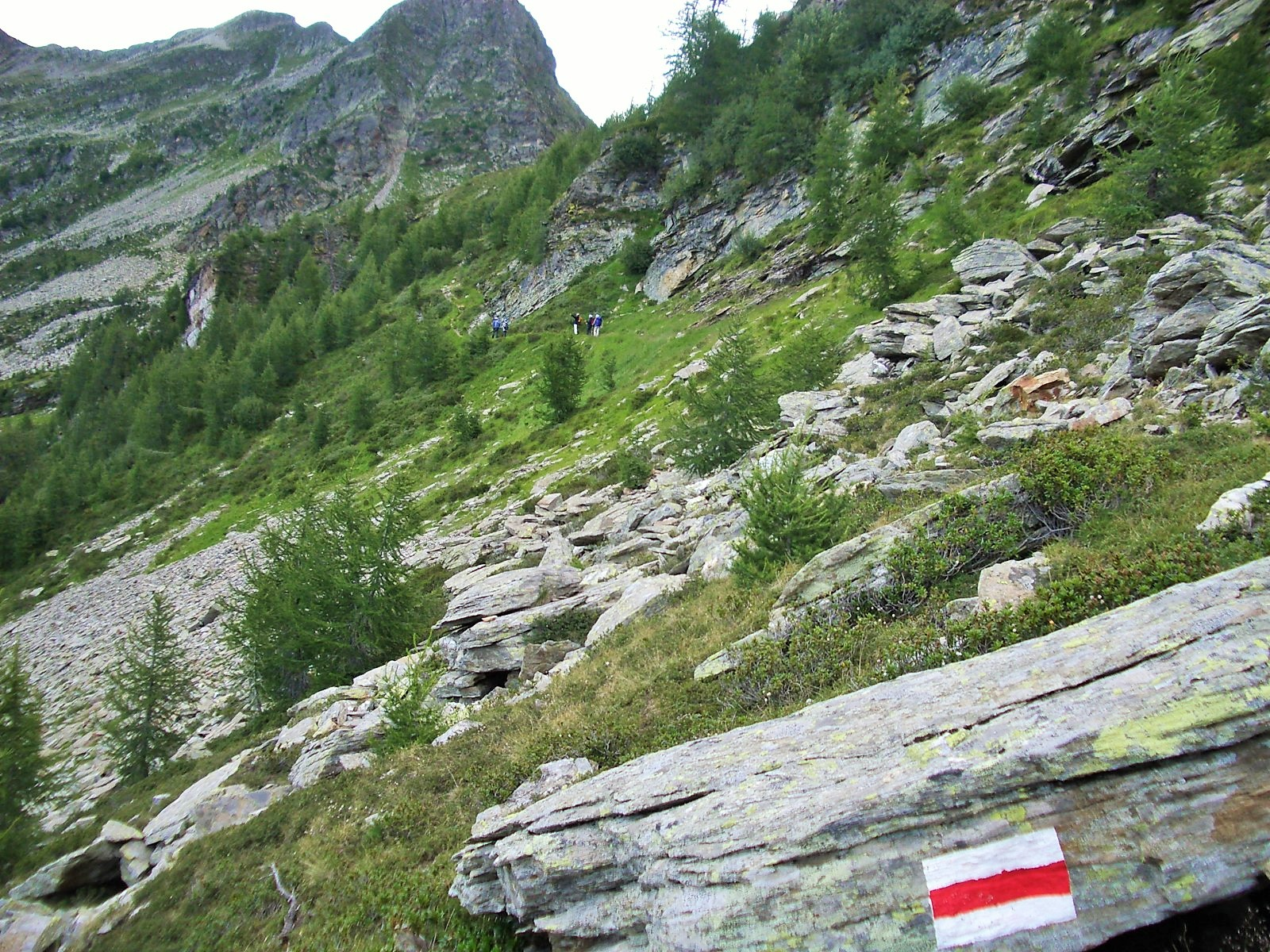 Höhenweg Sentiero Alpino Calanca GR, Schweiz